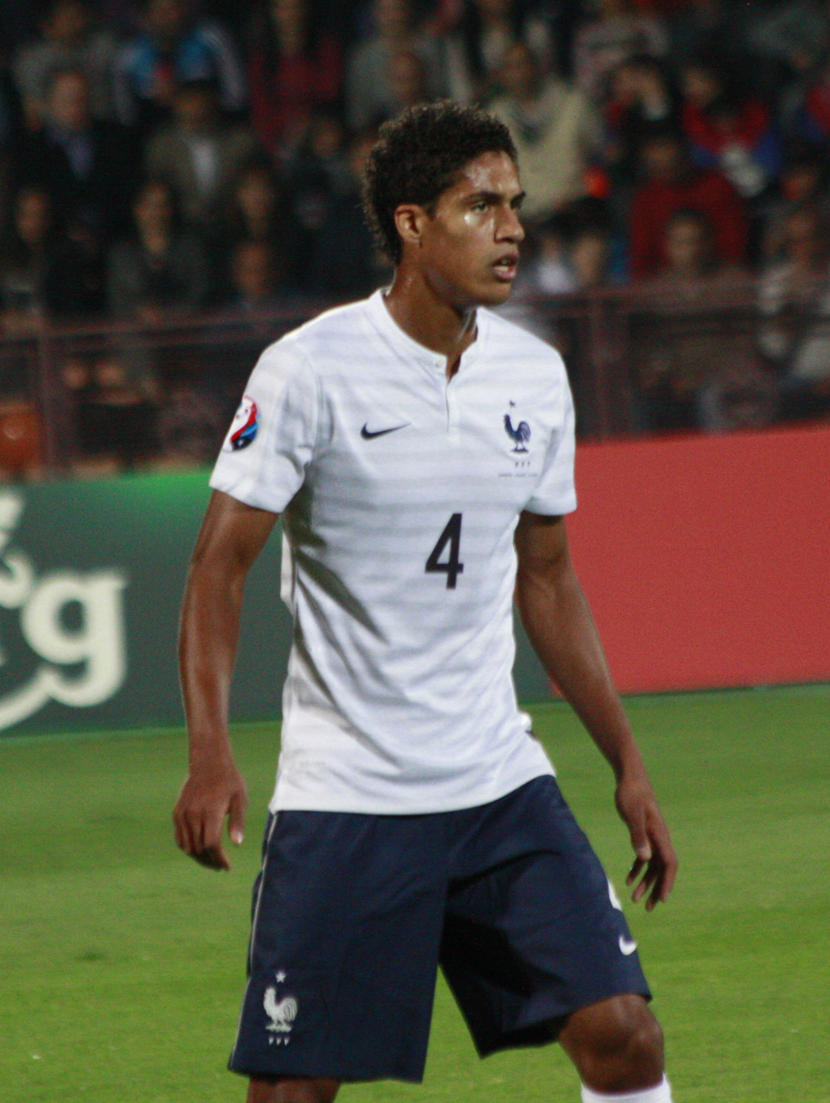 Erevan - Varane